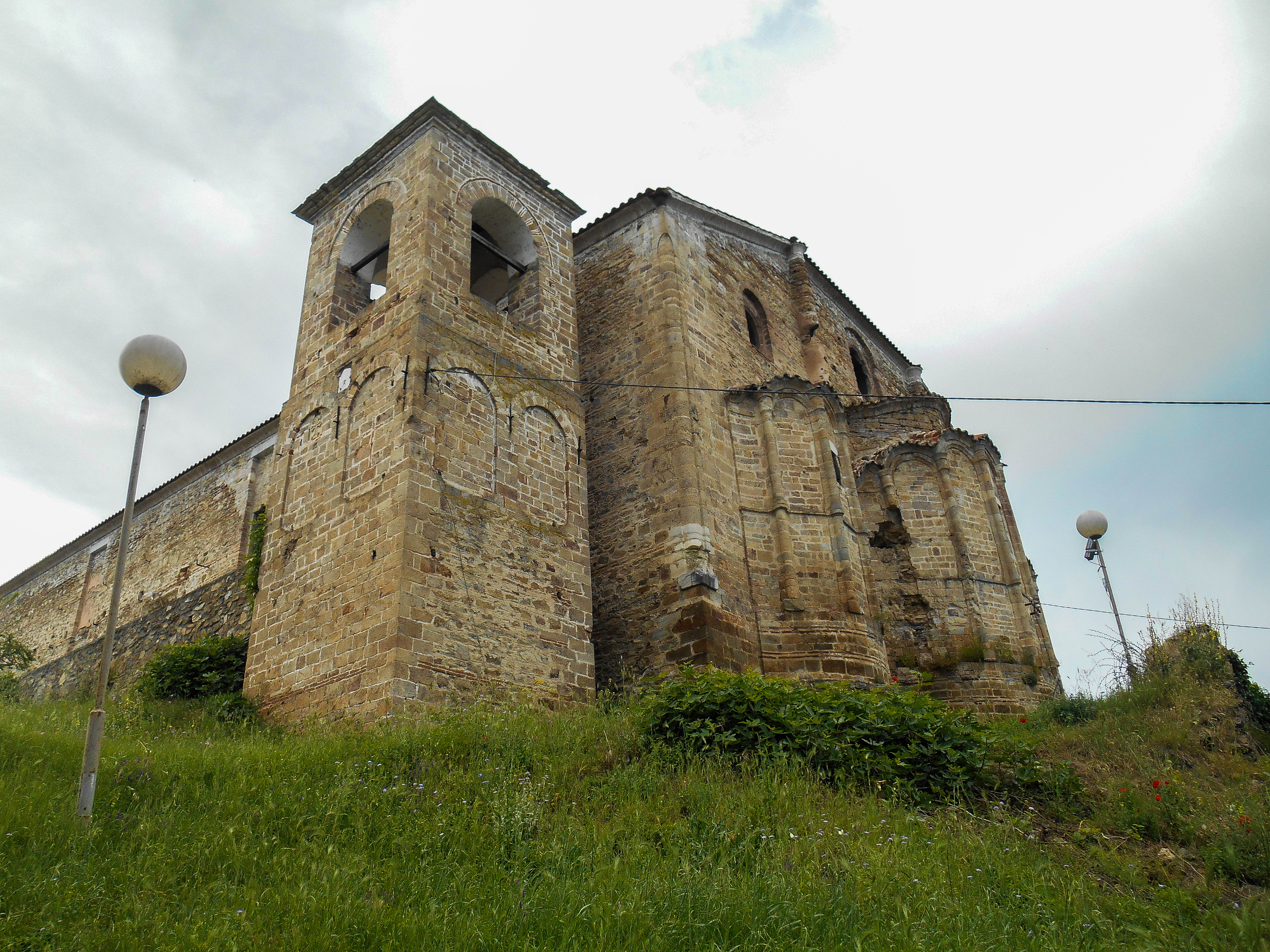 Црква „Св. Илија“ - Стар Дојран